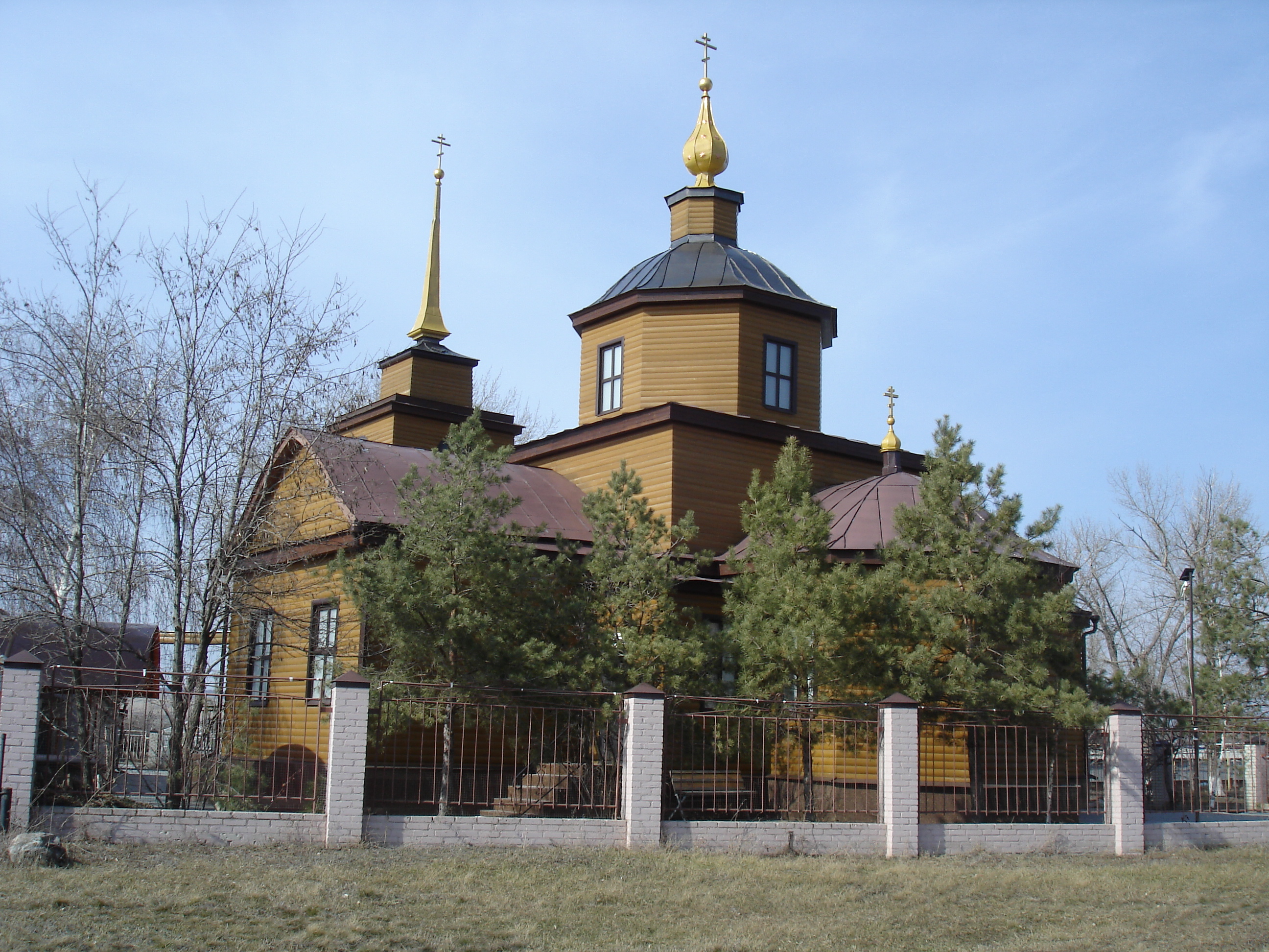 Крестовоздвиженская церковь в хуторе Астахов, Ростовская область.